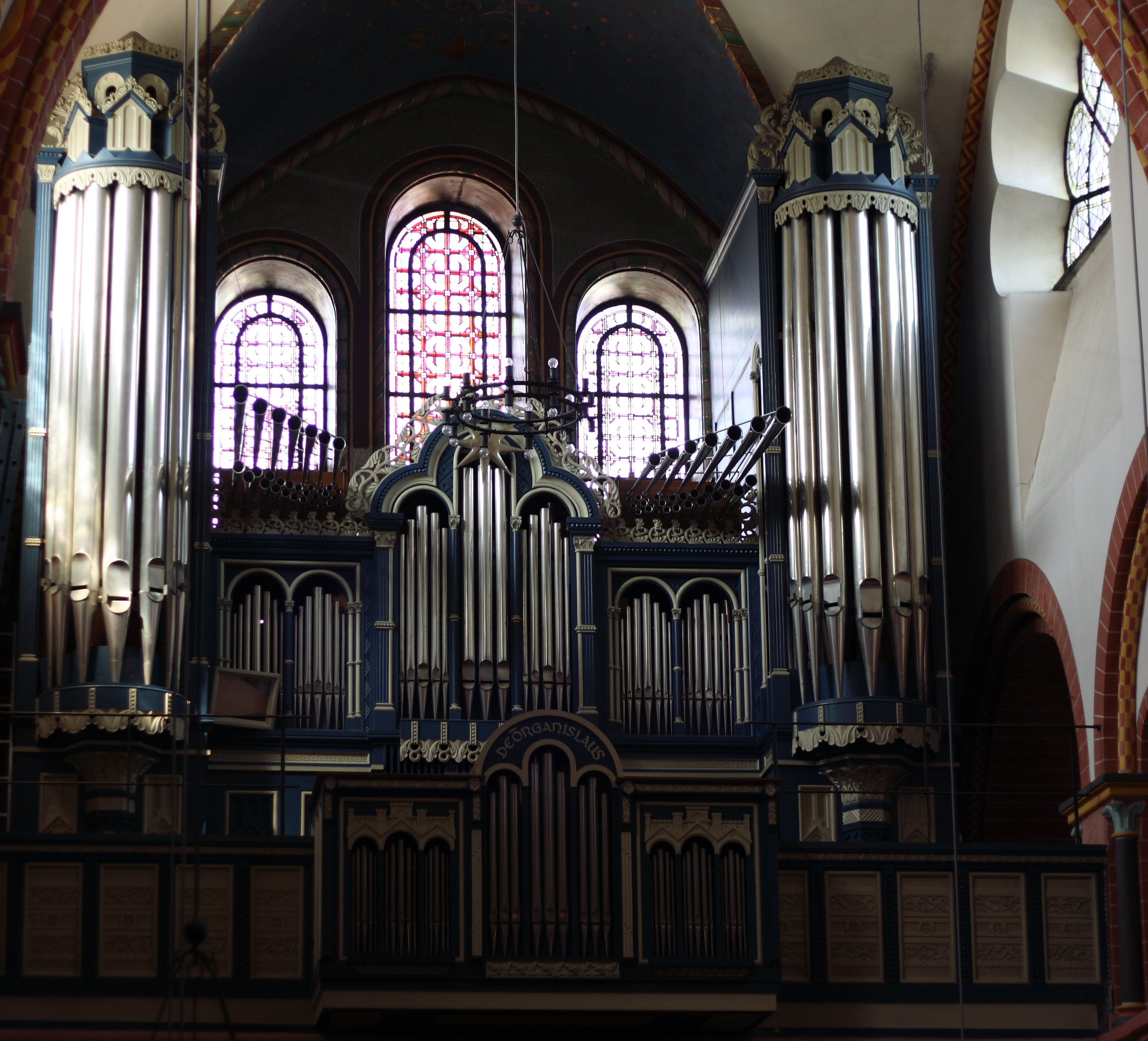 Orgel in der kathlischen Pfarrkirche St. Peter in Sinzig